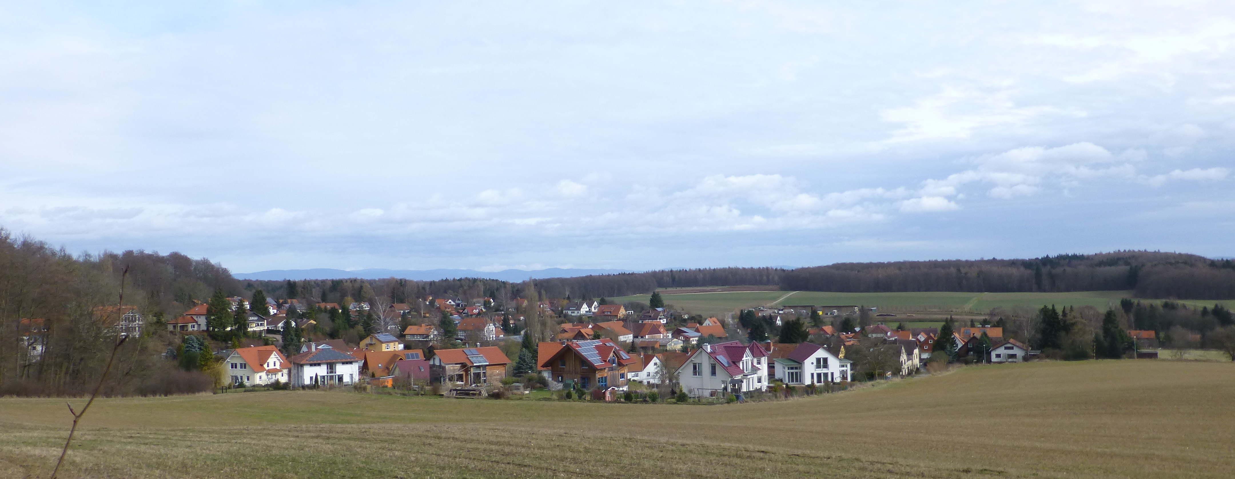 Blick von Südwesten auf Bösinghausen, Gemeinde Waake, Südniedersachsen